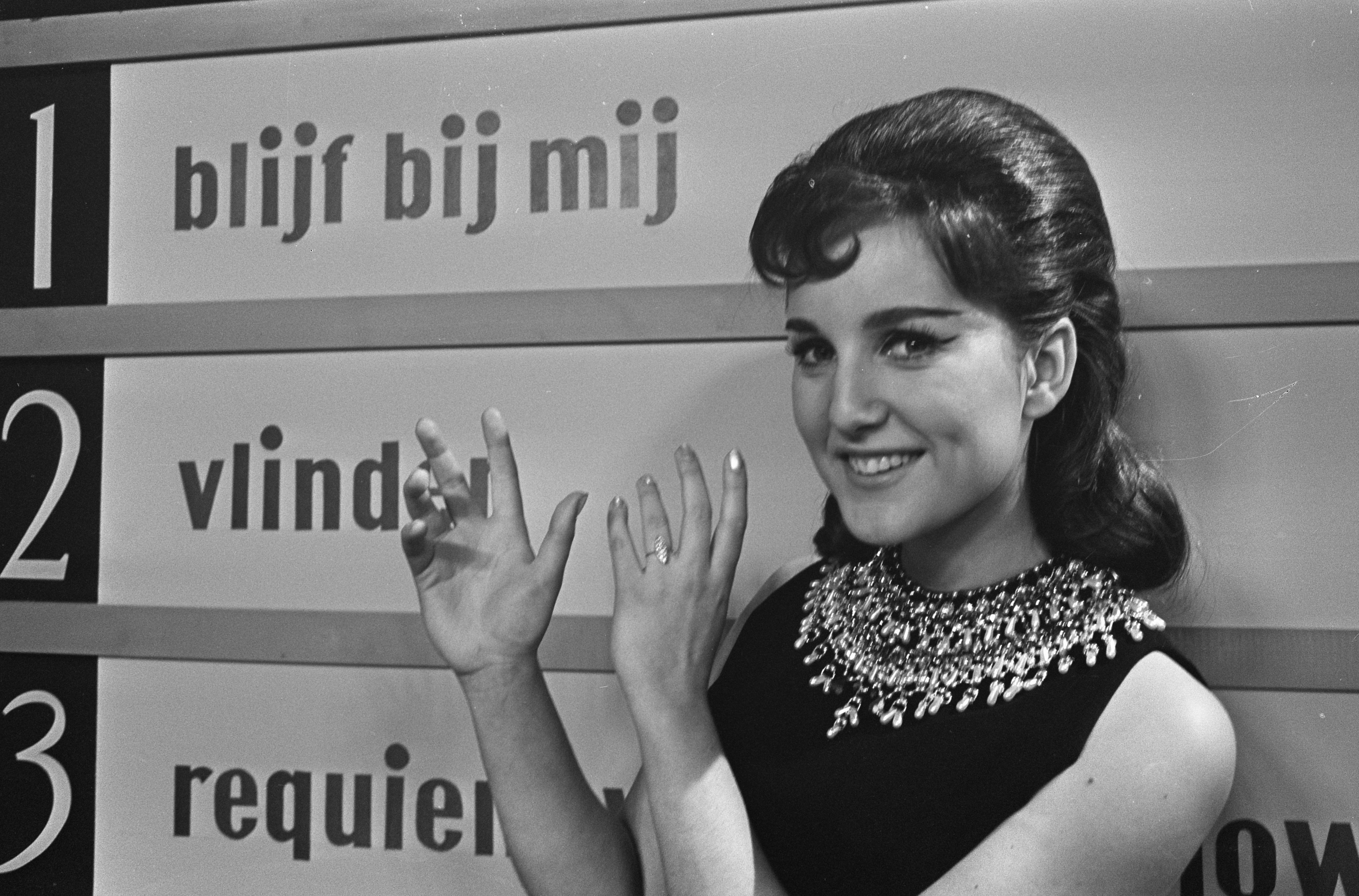 Collectie / Archief : Fotocollectie Anefo Reportage / Serie : [ onbekend ] Beschrijving : Voorronde finale Nationaal Songfestival 1965, Shirley Zwerus Datum : 12 februari 1965 Trefwoorden : artiesten, muziek, songfestivals, zangeressen Persoonsnaam : Zwerus Shirley Instellingsnaam : Nationaal Songfestival Fotograaf : Koch, Eric / Anefo Auteursrechthebbende : Nationaal Archief Materiaalsoort : Negatief (zwart/wit) Nummer archiefinventaris : bekijk toegang 2.24.01.05 Bestanddeelnummer : 917-4244